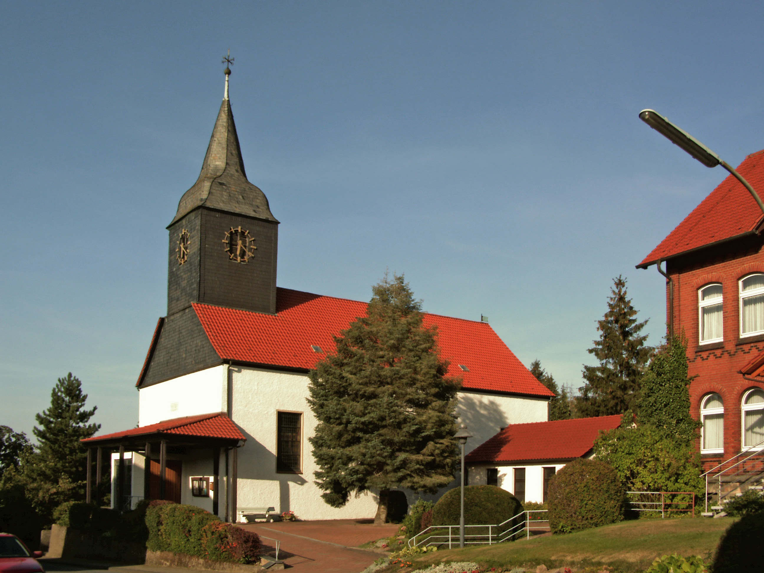 Katholische Kirche Hl. Familie in Vienenburg, Landkreis Goslar